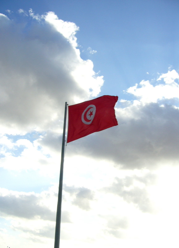 Tunisian Flag